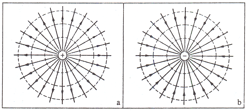 Karga elektriko puntual positibo baten inguruko eremu-lerroak eta gainazal ekipotentzialak (a) eta karga elektriko puntual positibo baten ingurukoak (b).